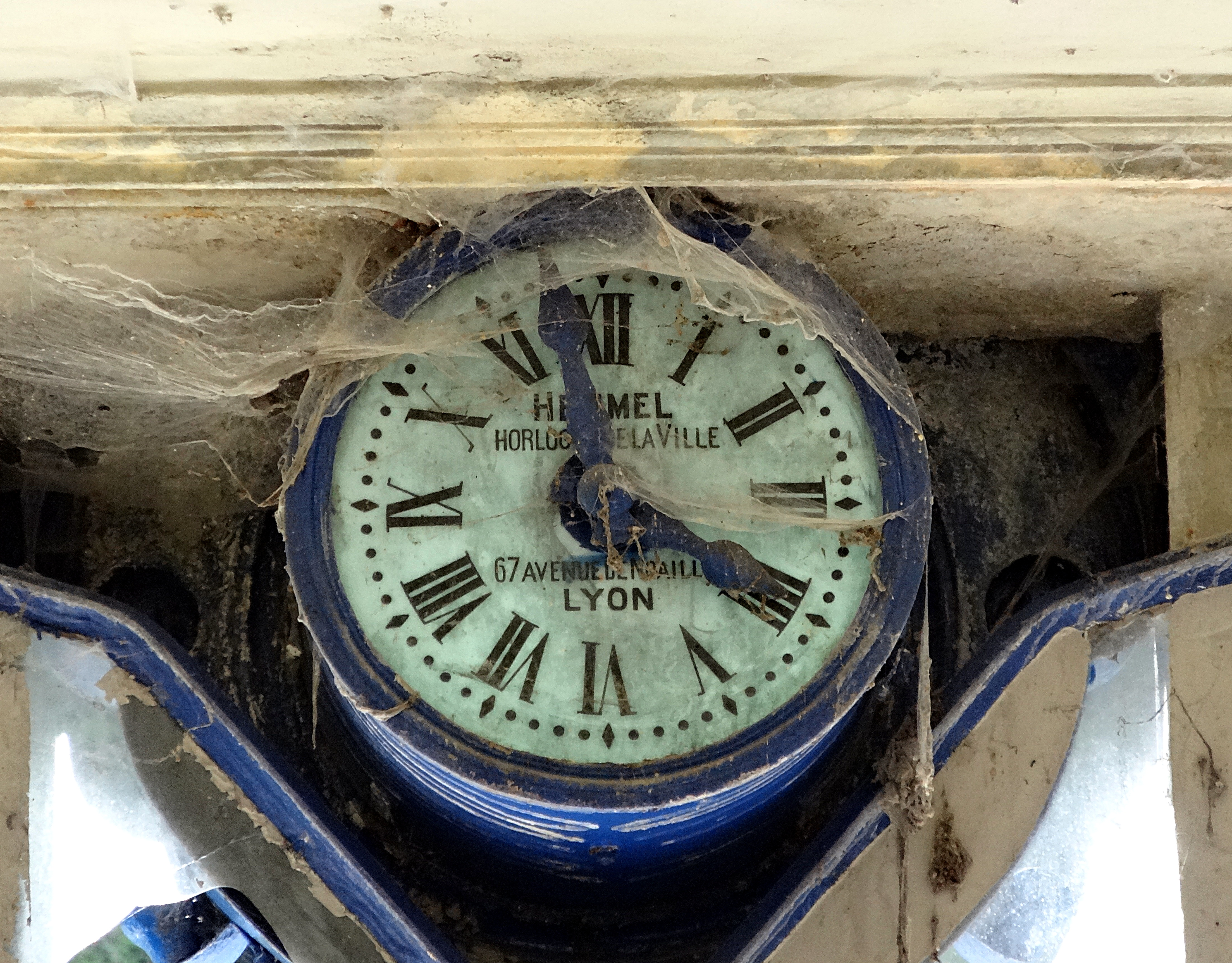 Horloge intérieure, entrée de l'ancienne filature de la Schappe, Saint-Rambert-en-Bugey, France